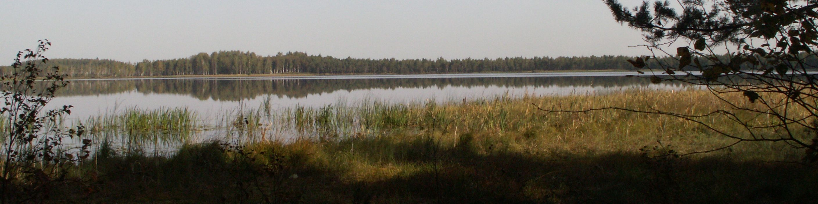 lake Praviršulis, Lithuania